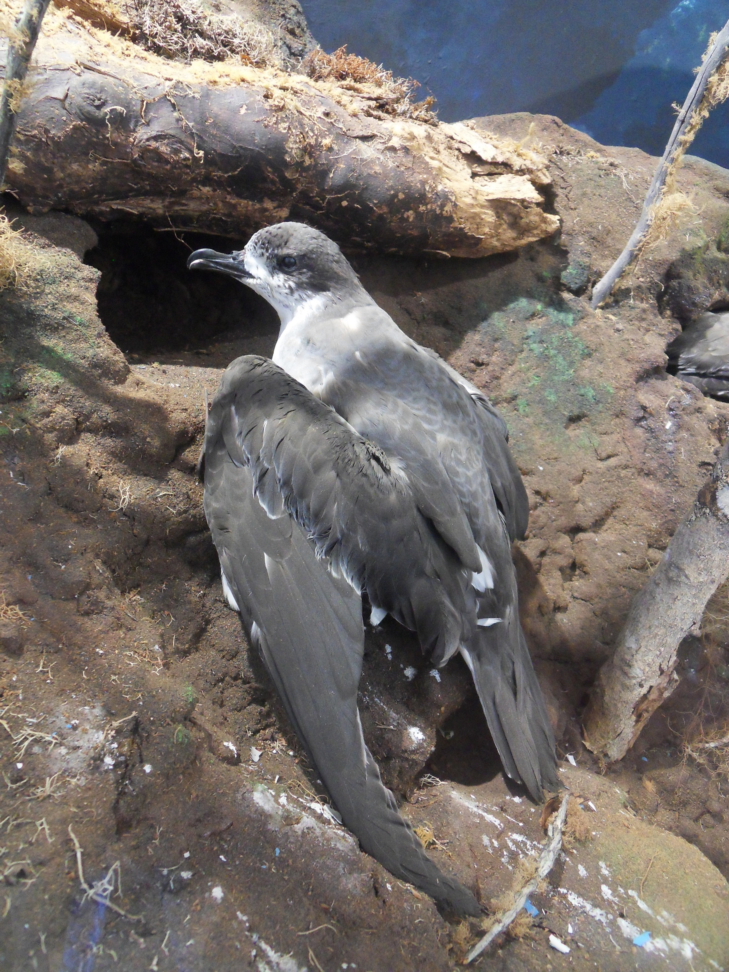 Pétrel de Barau (Pterodroma baraui) naturalisé au Muséum d'histoire naturelle de La Réunion.